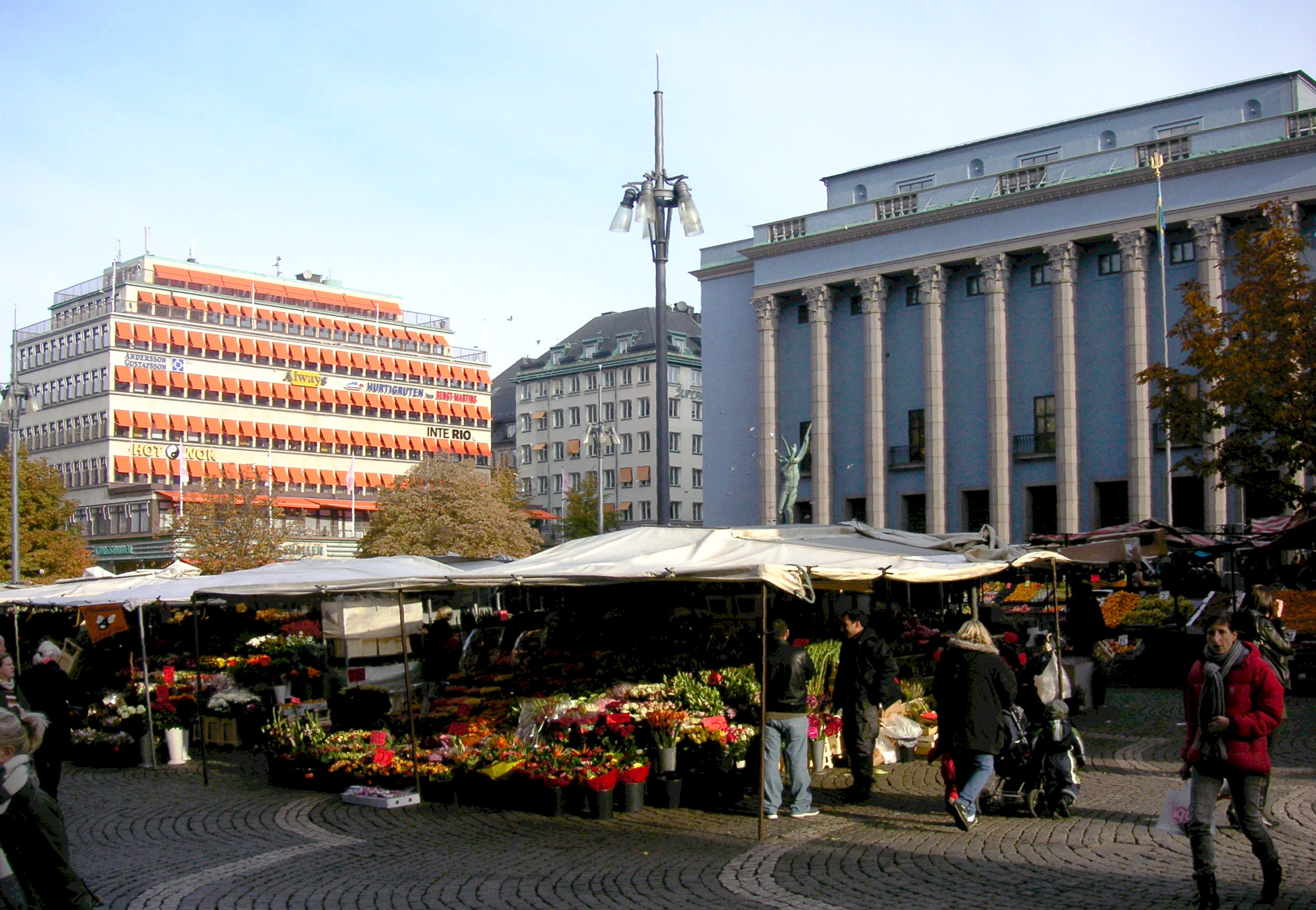 Hötorget i Stockholm med Konserthuset i bakgrunden till höger